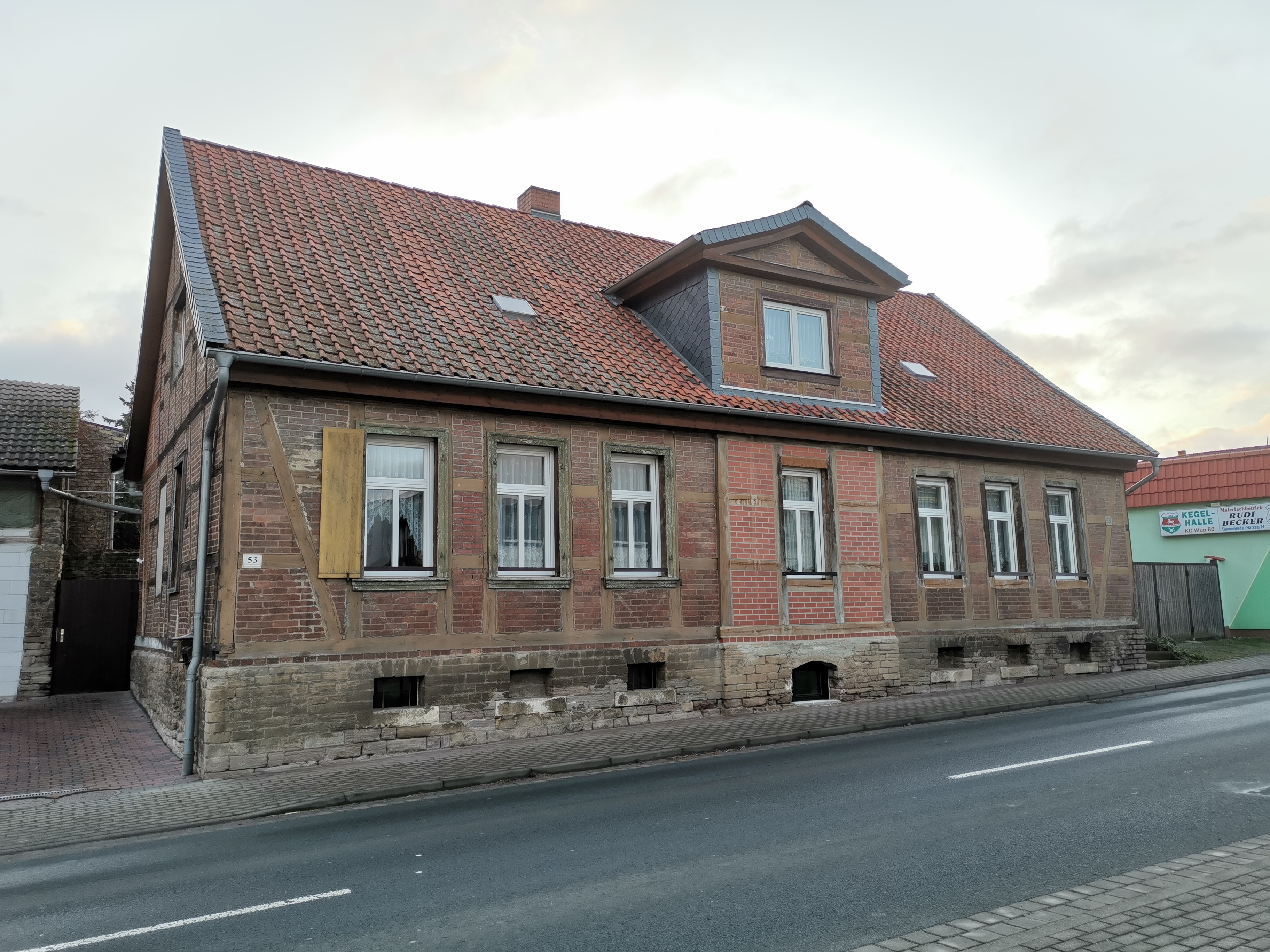 Blankenburger Straße 53 in Timmenrode